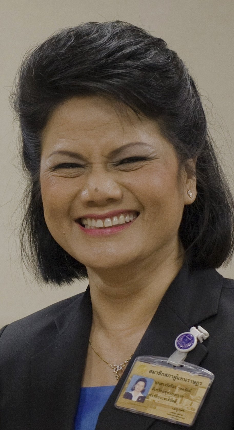 นายกรัฐมนตรี ณ ห้องวิปรัฐบาล อาคารรัฐสภา วันพุธ ที่ 24 พฤศจิกายน พ.ศ.2553 (Photographer attached to the Prime Minister of the Kingdom of Thailand : Peerapat Wimolrungkarat / พีรพัฒน์ วิมลรังครัตน์) @is50mm